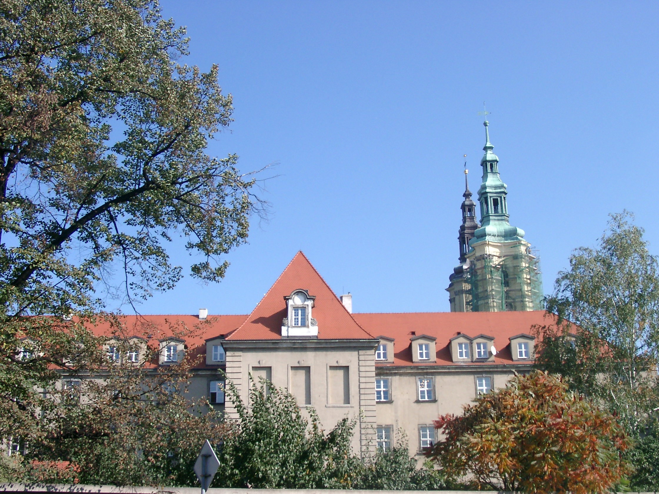 Klasztor franciszkanów w Legnicy (Polska). Franciscans monastery in Legnica, Poland.